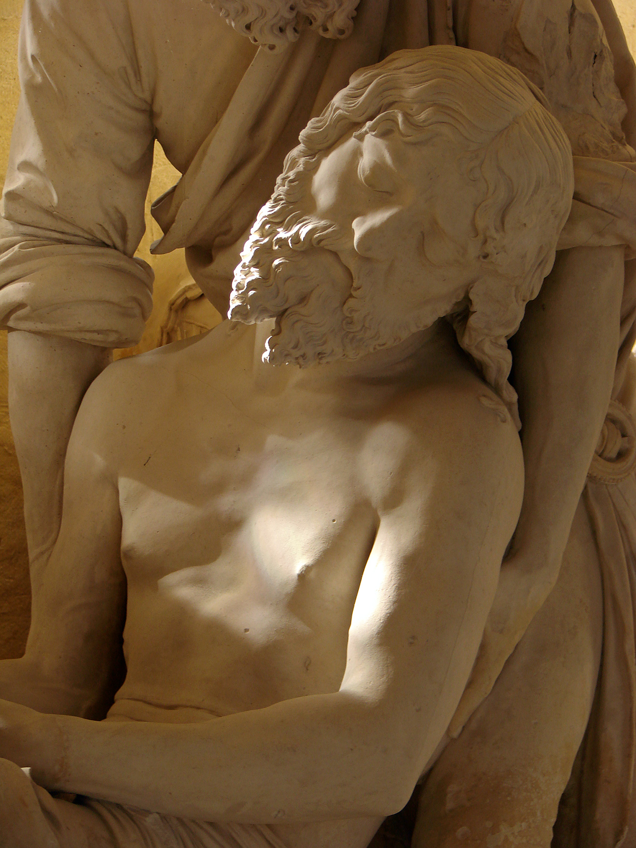 Mise au Tombeau (ou Saint Sépulcre) par Ligier Richier. Eglise Saint-Etienne à Saint-Mihiel.